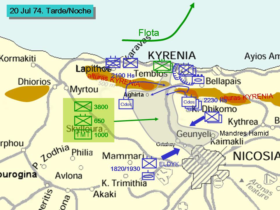 Operación Atila. Situación la tarde del 20 Jul